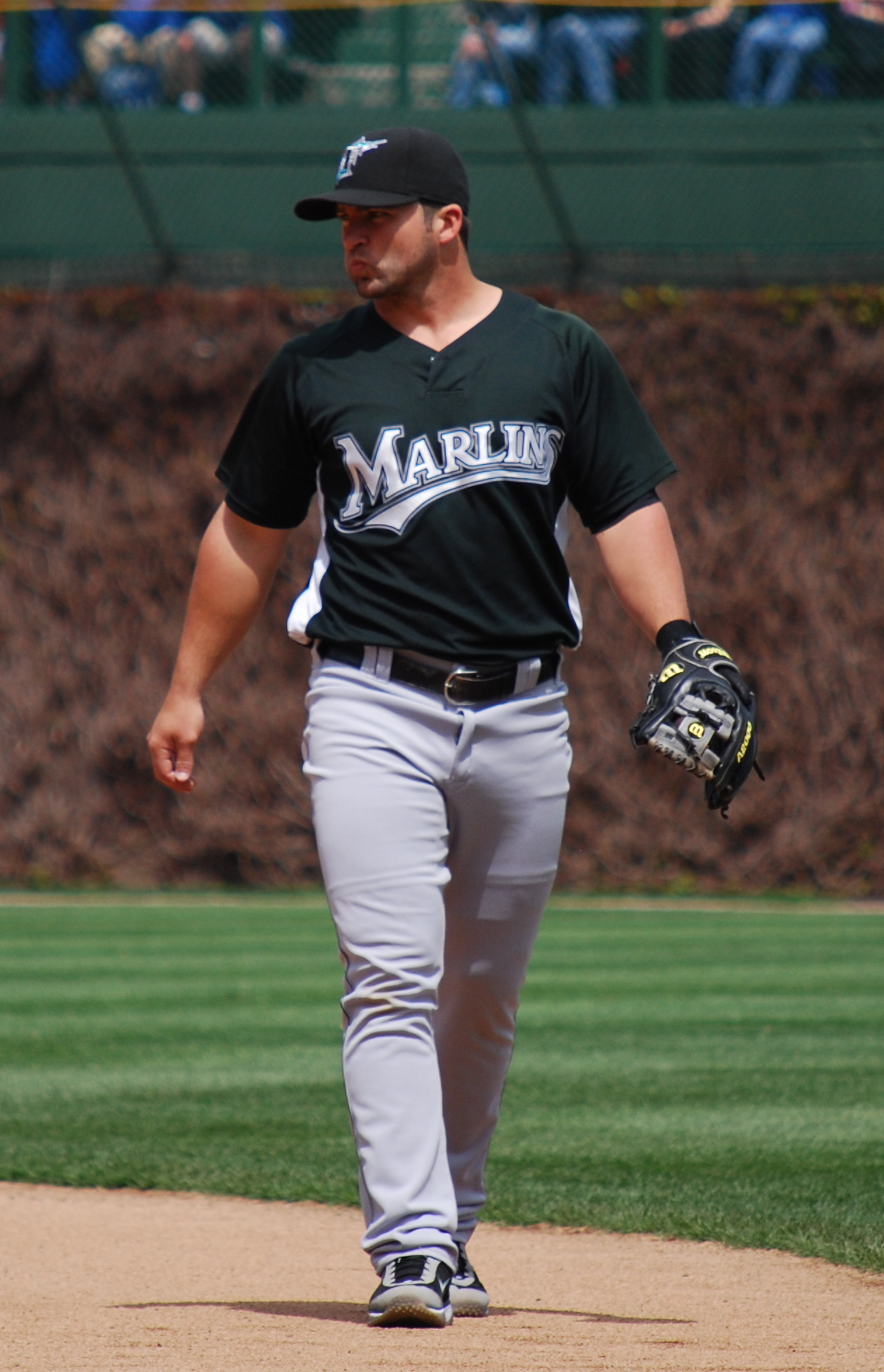 Dan Uggla.